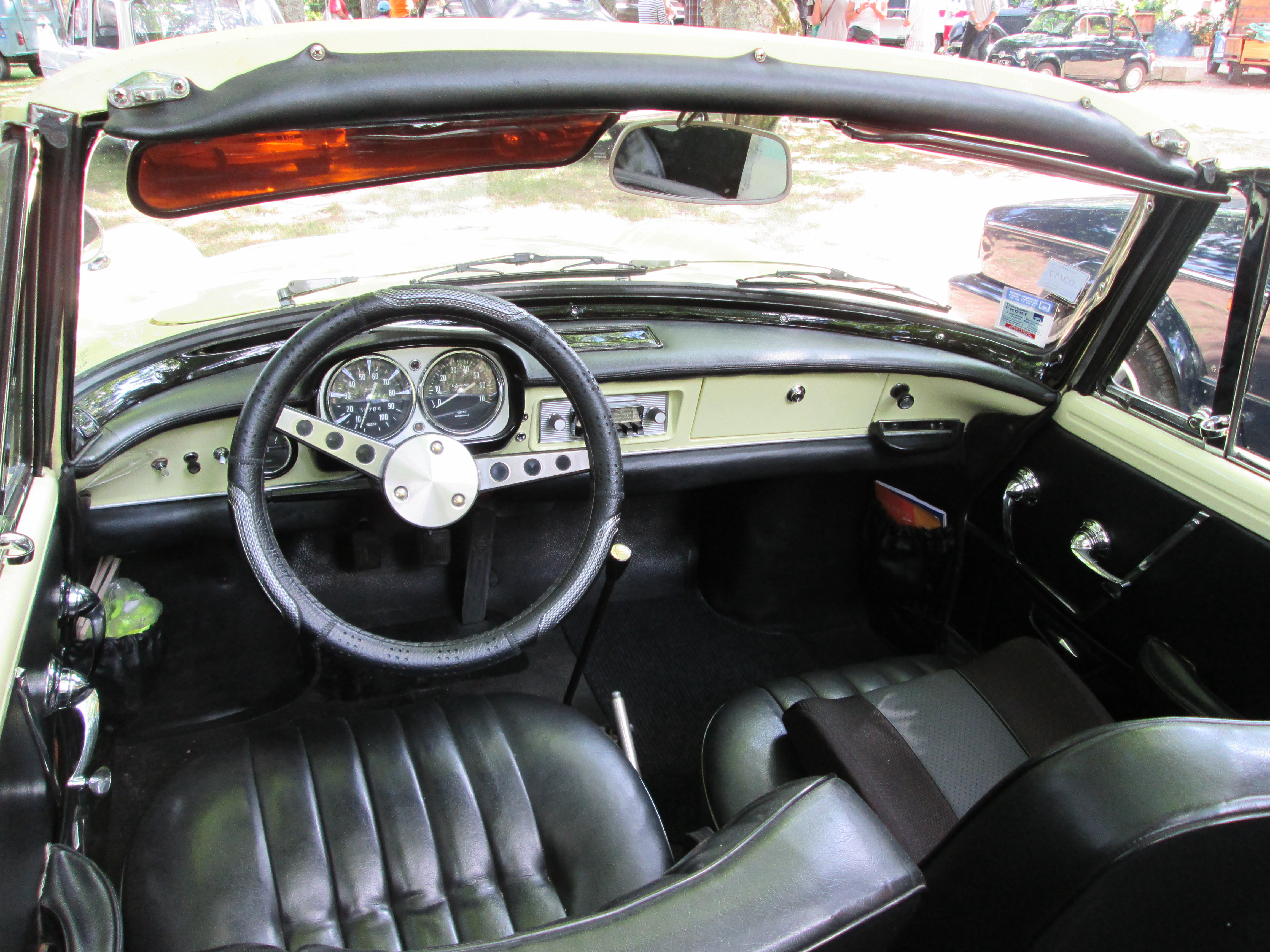 Renault Caravelle 1 108 cm3 de 1963, jaune anis (ou jaune pastis ?), venant des États-Unis (le compteur est gradué en miles). Restauration partielle moteur et habitacle.